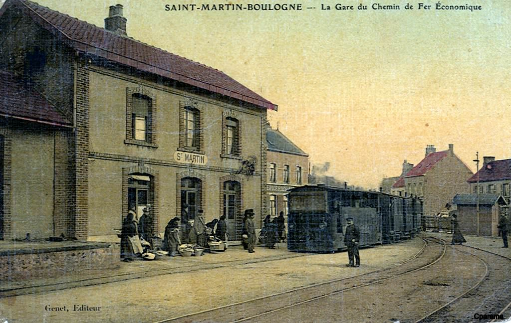 Carte postale Titre : SAINT-MARTIN-BOULOGNE - La Gare du Chemin de Fer Économique